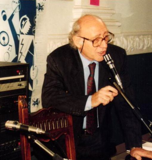 Mario Costa (1995)